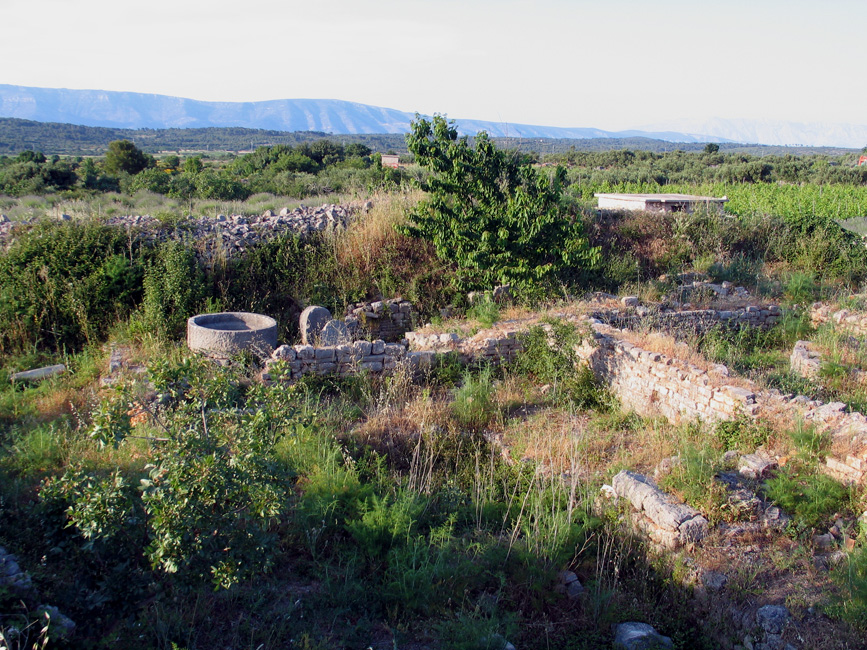 ostaci villae rusticae Kupinovik u Starigradskom polju na Hvaru